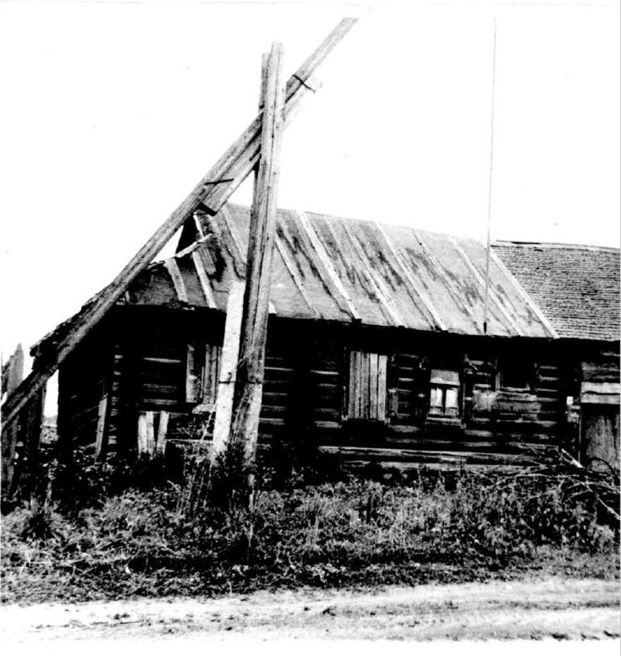 Двойная изба гражданина Матвеева А.И.